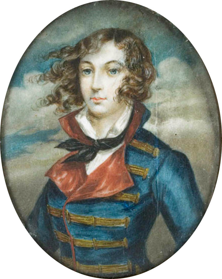 Беларуская (тарашкевіца): Партрэт Эміліі Плятэр (Emilija Plater)